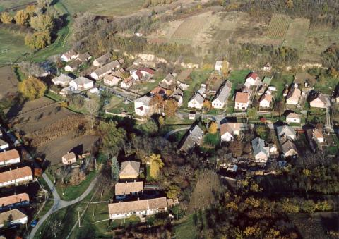 Szárazd, Hungary, aerialphotography